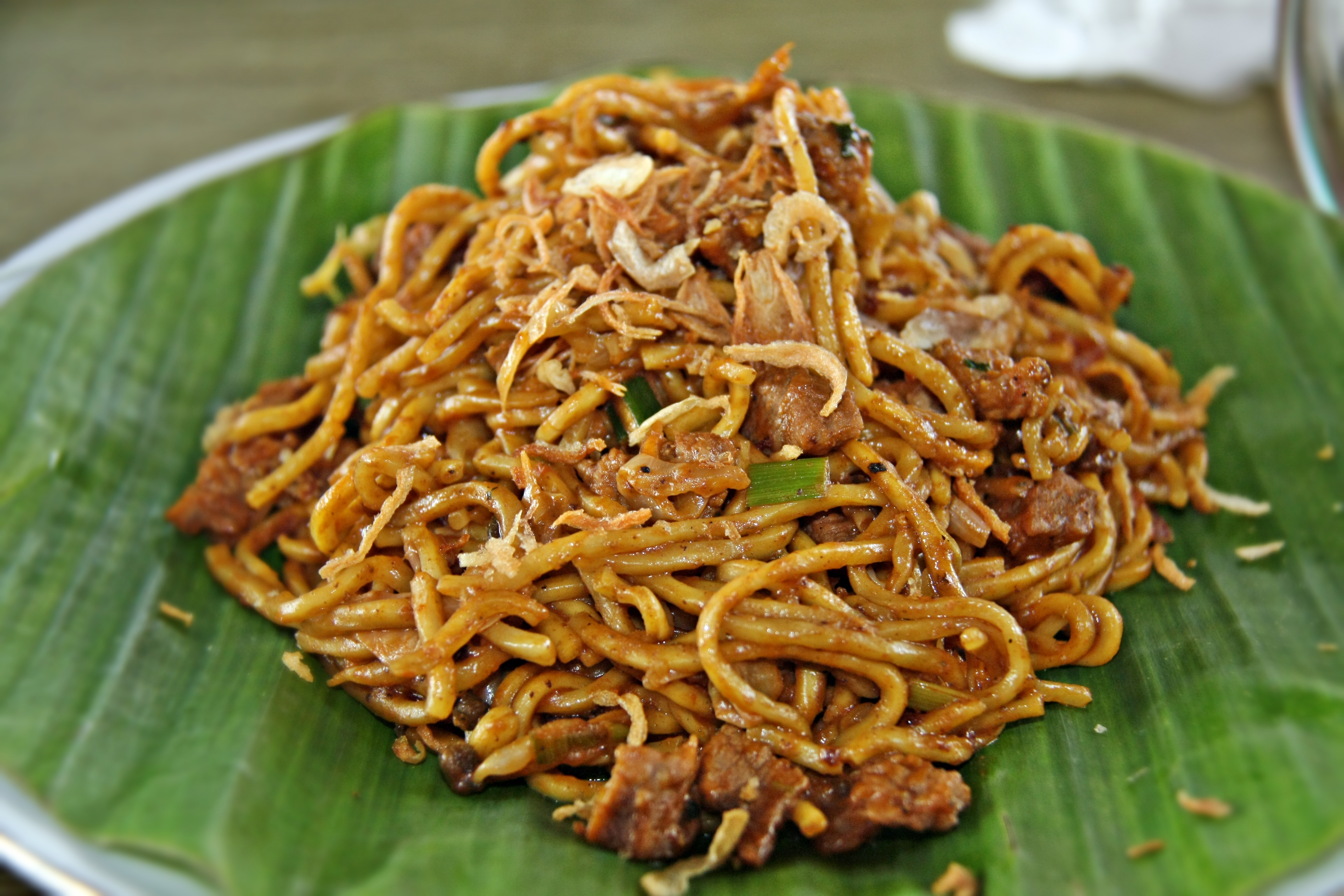 Razali noodles